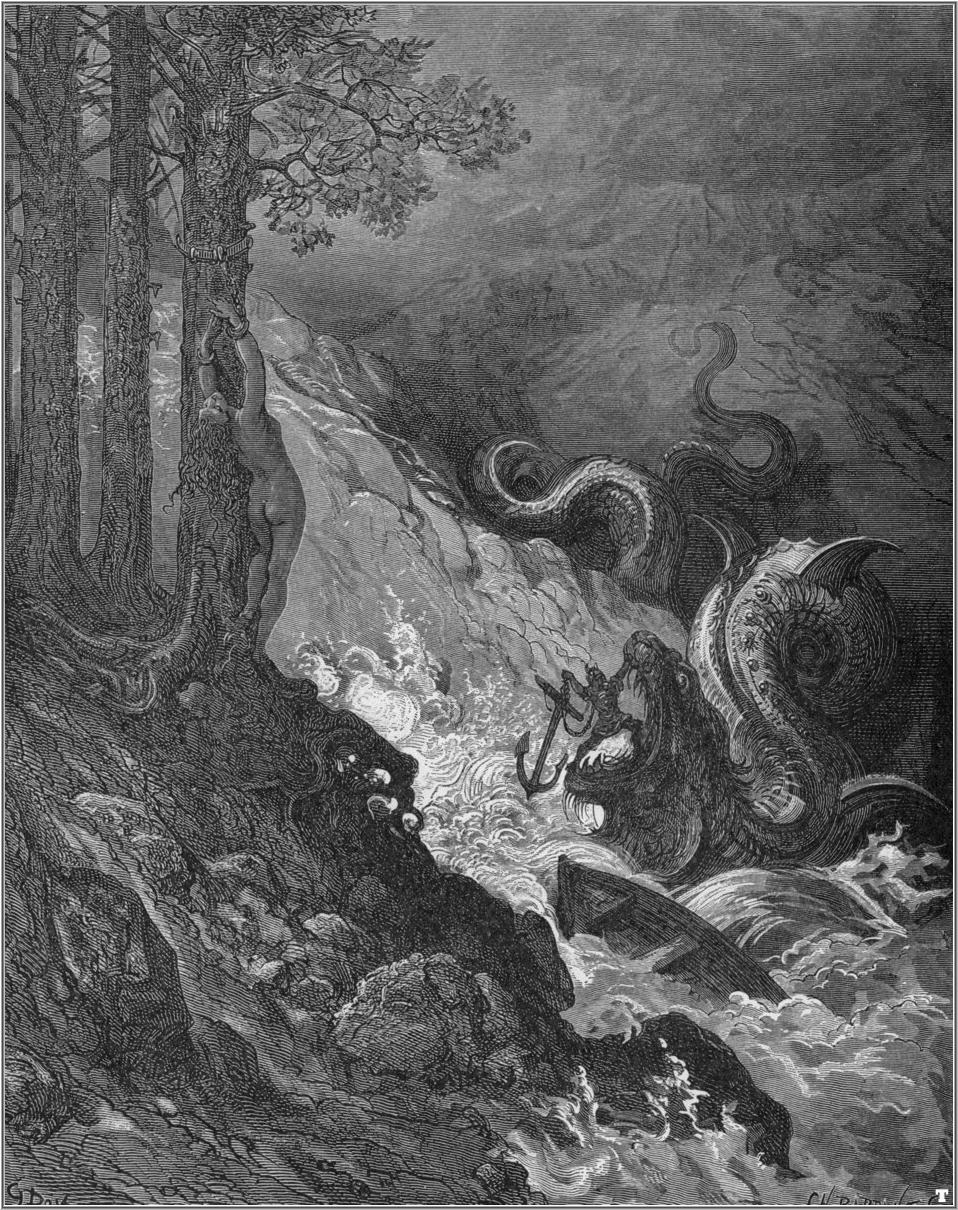 illustration of Ludovico Ariosto’s “Orlando Furioso”.